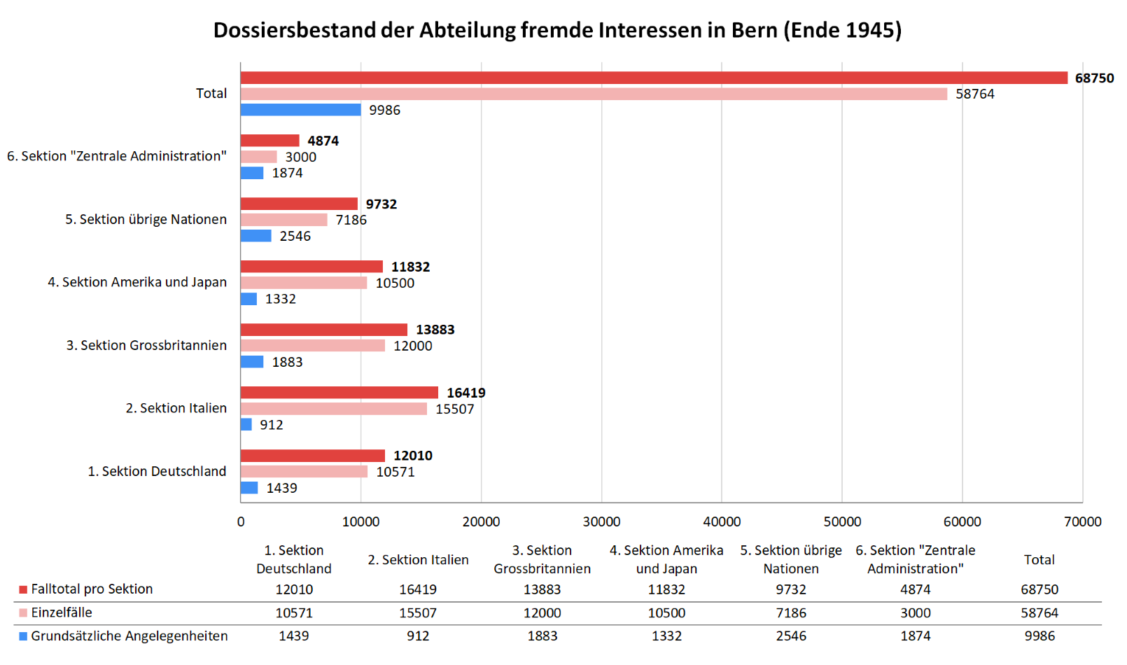 Das Diagramm zeigt den Dossiersbestand der Abteilung für fremde Interessen in Bern Ende 1945. Die Informationen stammen aus dem Rechenschaftsbericht der Abteilung für fremde Interessen des Eidgenössischen Politischen Departementes für die Zeit von September 1939 bis Anfang 1946.